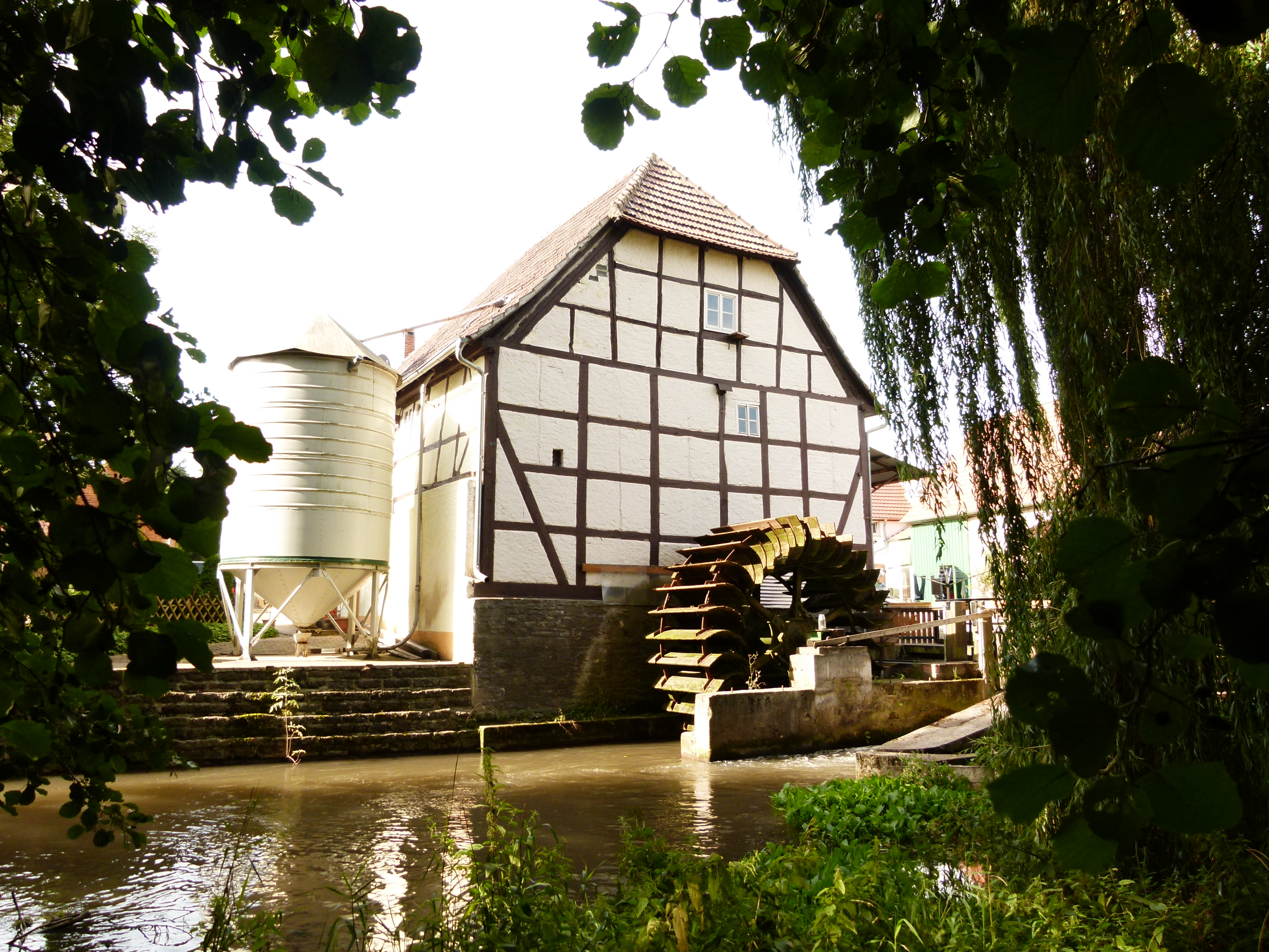 Obermühle Edersleben, Wasserrad nach historischen Plänen von 1903 neu erbaut